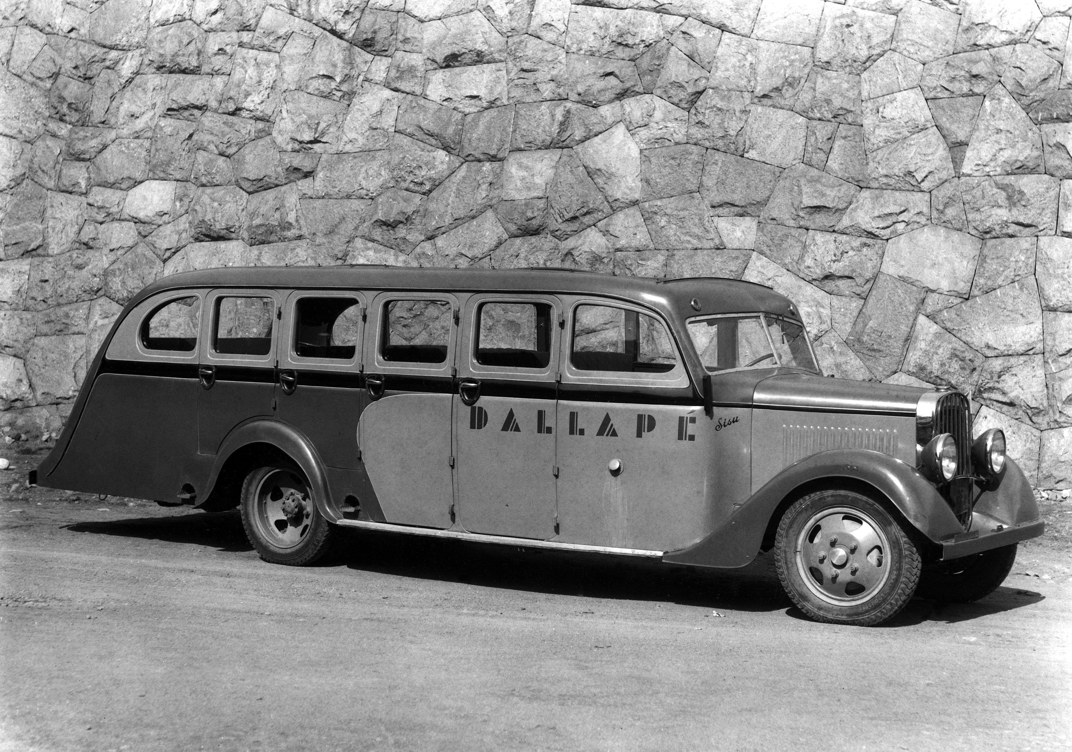 Alkuperäinen kuvaus: Tanssiorkesteri Dallapén Sisu-merkkinen auto. Lisäys: Sisu S-322D.